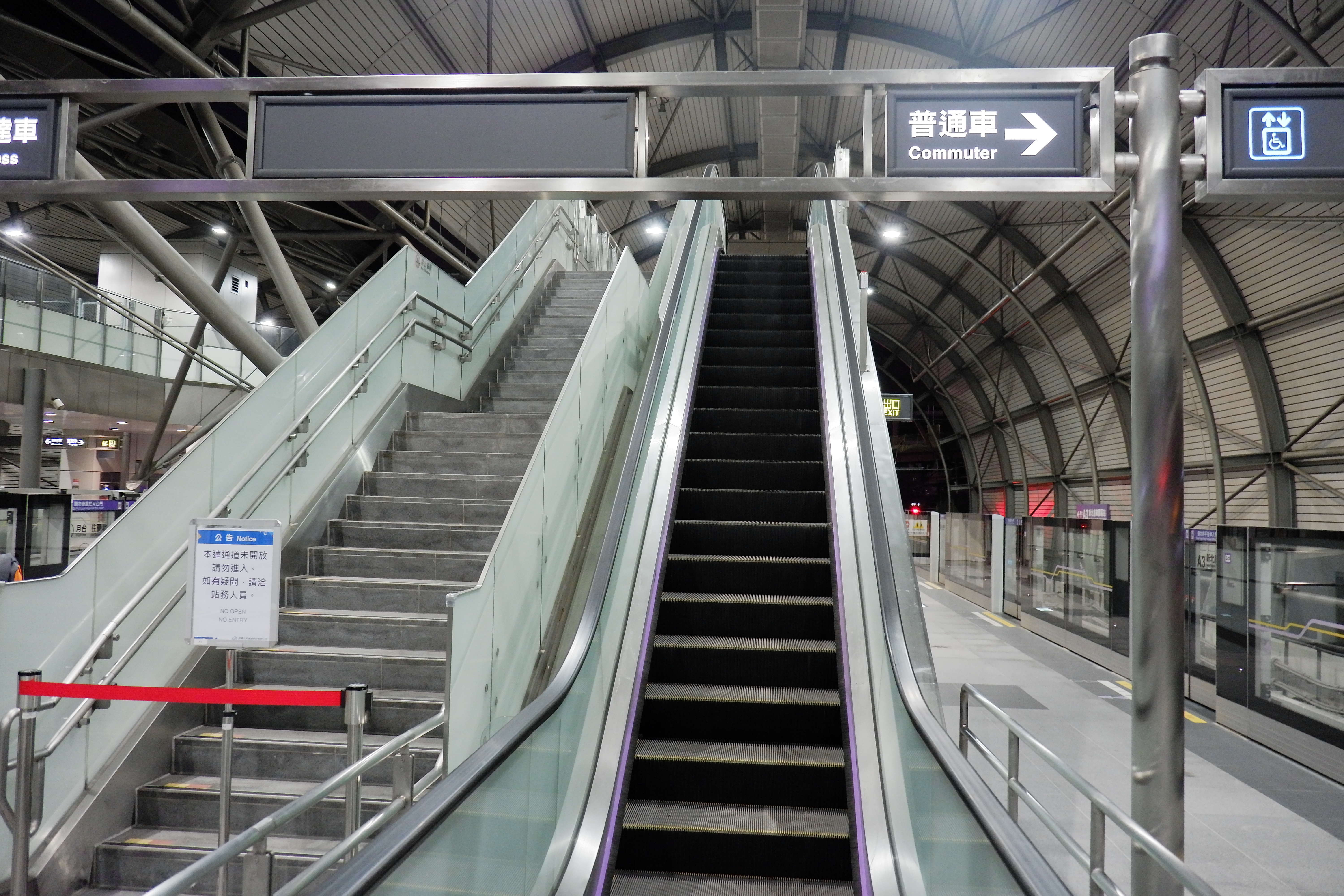 桃園機場捷運新北產業園區站尚未開放的3F連通層階梯。